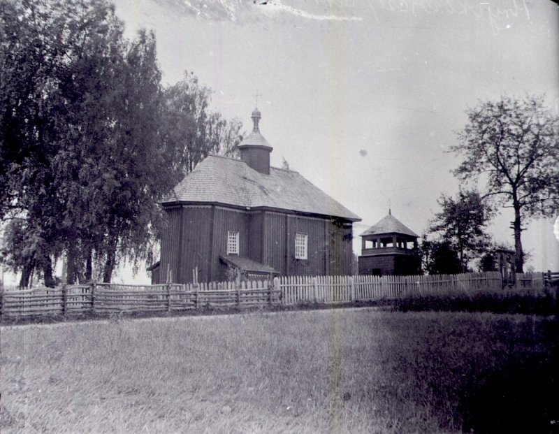 Беларуская (тарашкевіца): Грыцкавічы (Hryckavičy). Царква